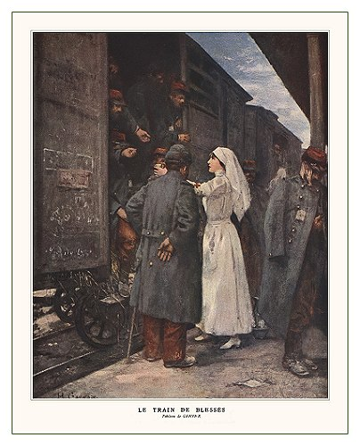 Le Train des Blessés Henri Gervex